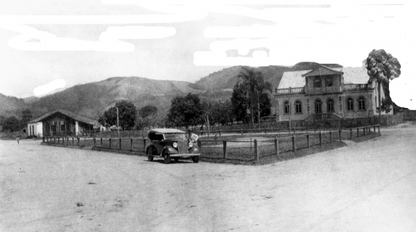 Praça Coronel Collaço, Casa do Pastor Schwab e Fábrica de Banha de Jacó Batista Uliano. Possivelmente final da década de 1920.